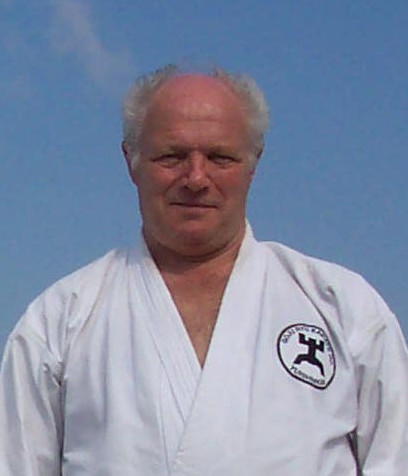 Fritz Nöpel auf Mallorca 2002